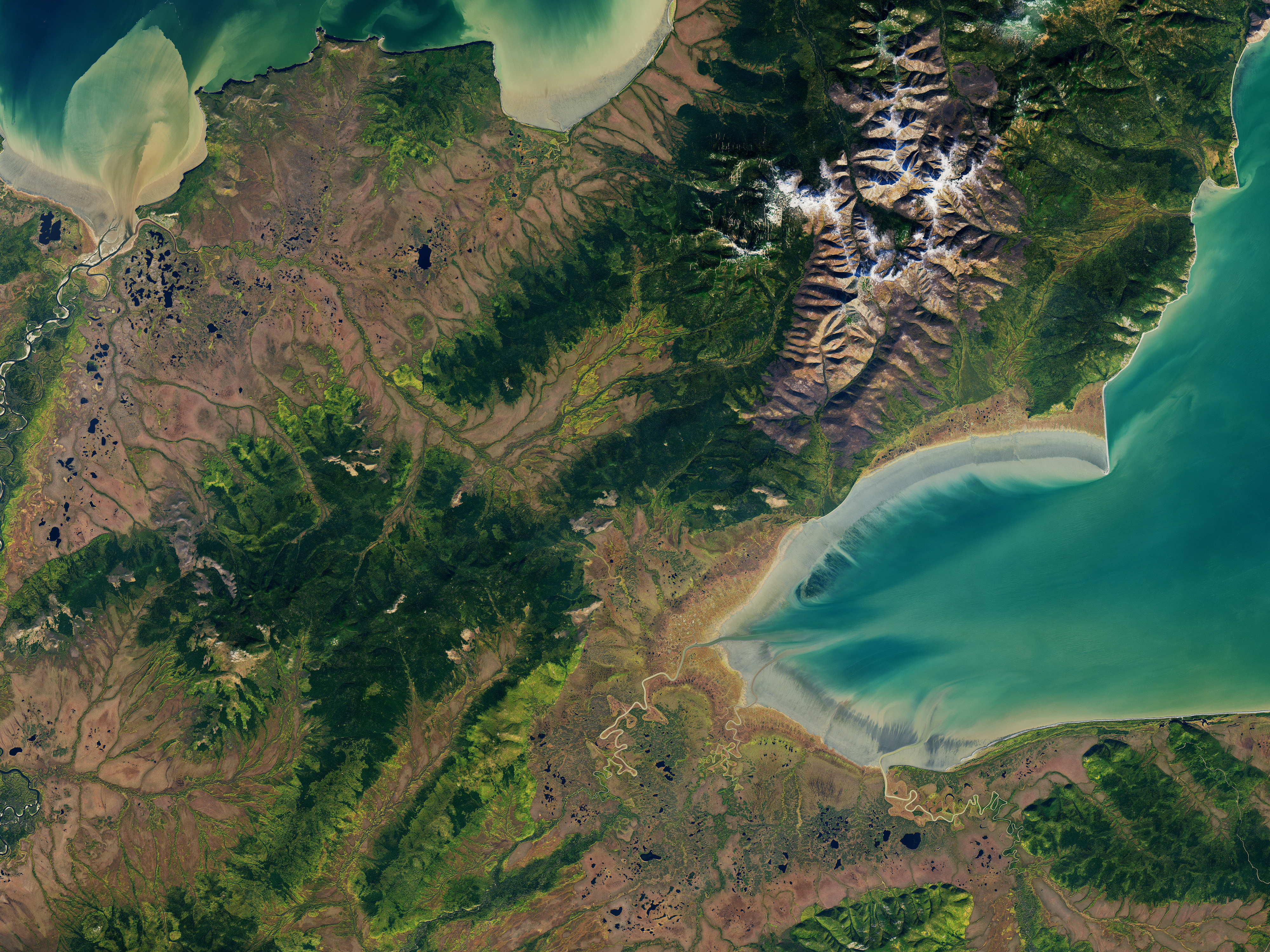 Ульбанский залив, часть залива Академии.